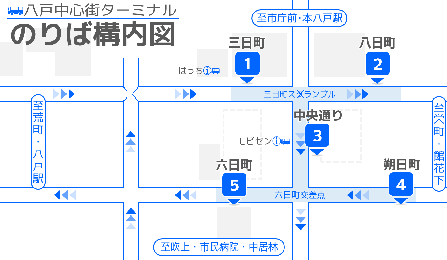 八戸中心街ターミナルの簡易構内図